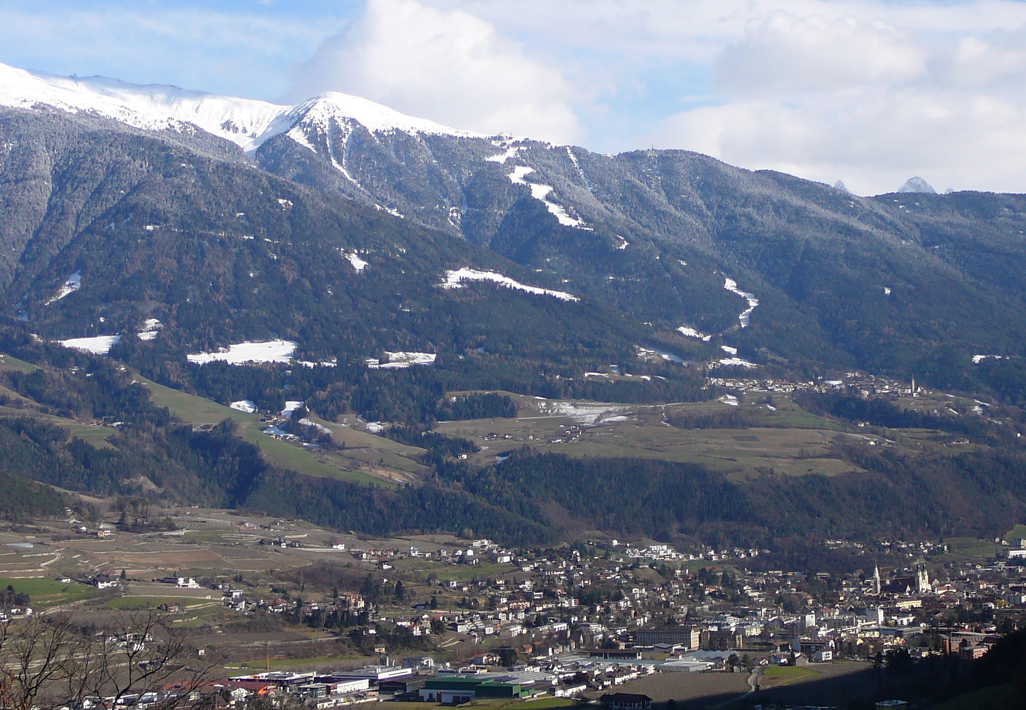 Vista dalla Plose da Varna